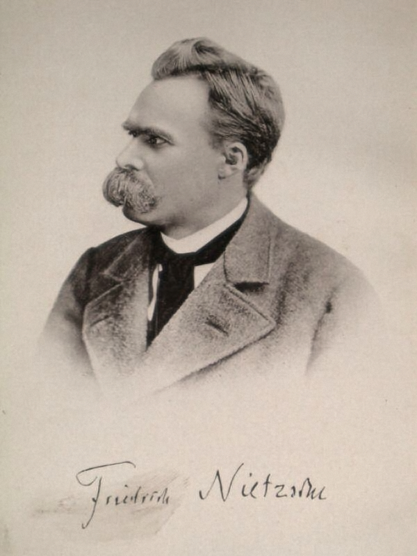 Bildnis Friedrich Nietzsches um 1885 mit seiner Unterschrift